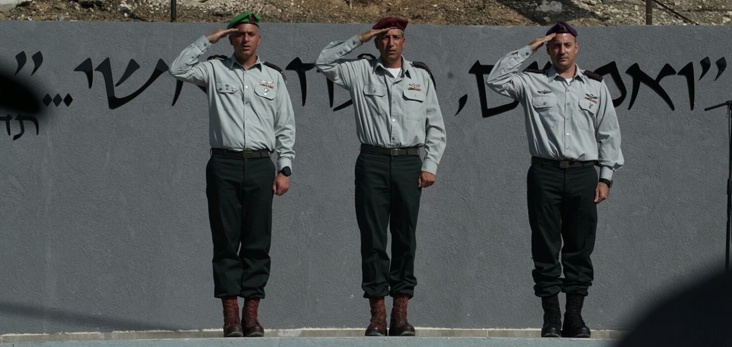 אל"ם עידן כץ מחליף את אל״ם רועי שטרית כמפקד החטיבה המרחבית אפרים.